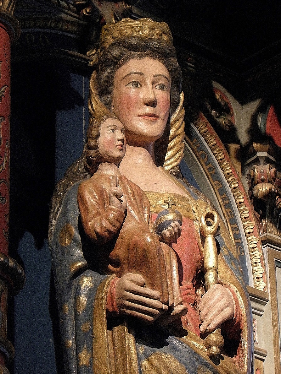 Détail de la statue de N.D. de Tout-Remède. Église de Rumengol au Faou (29).